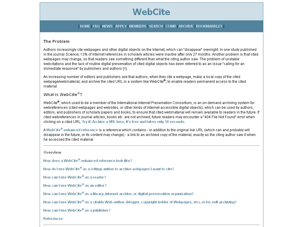 Screenshot os